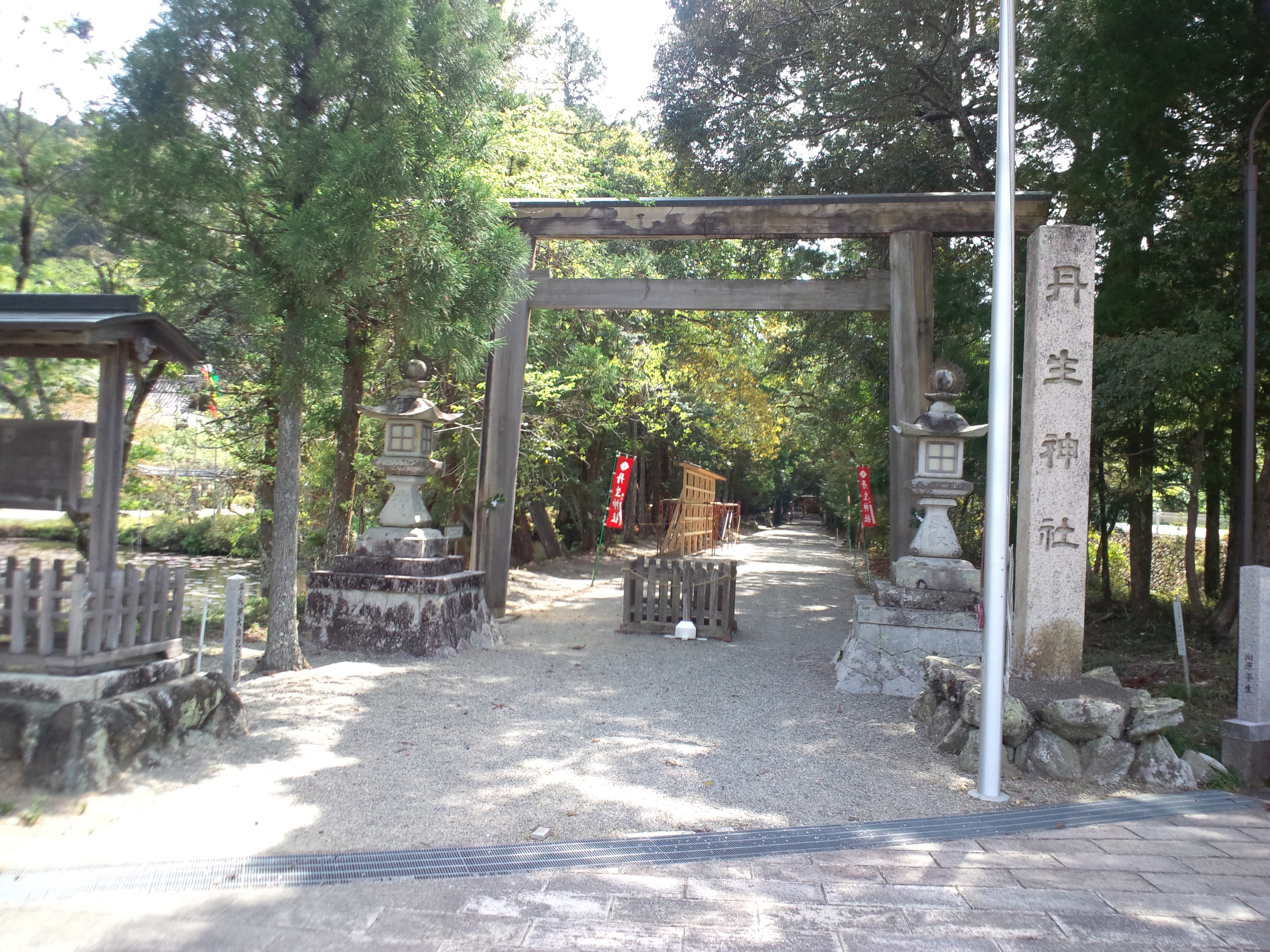 丹生神社 入口の鳥居